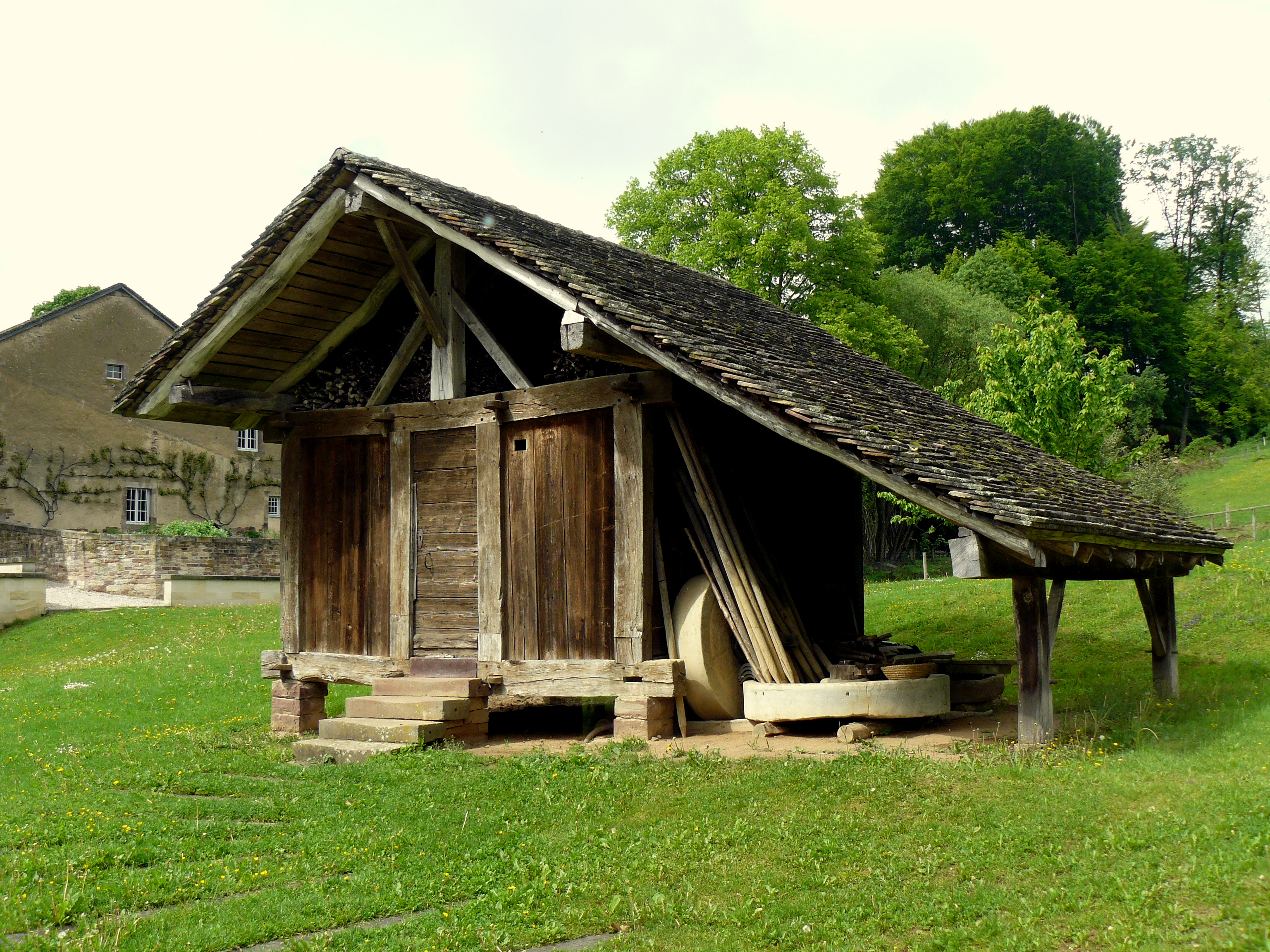 Chalot traditionnel présenté à l'Ecomusée de Fougerolles (Haute-Saône, France)